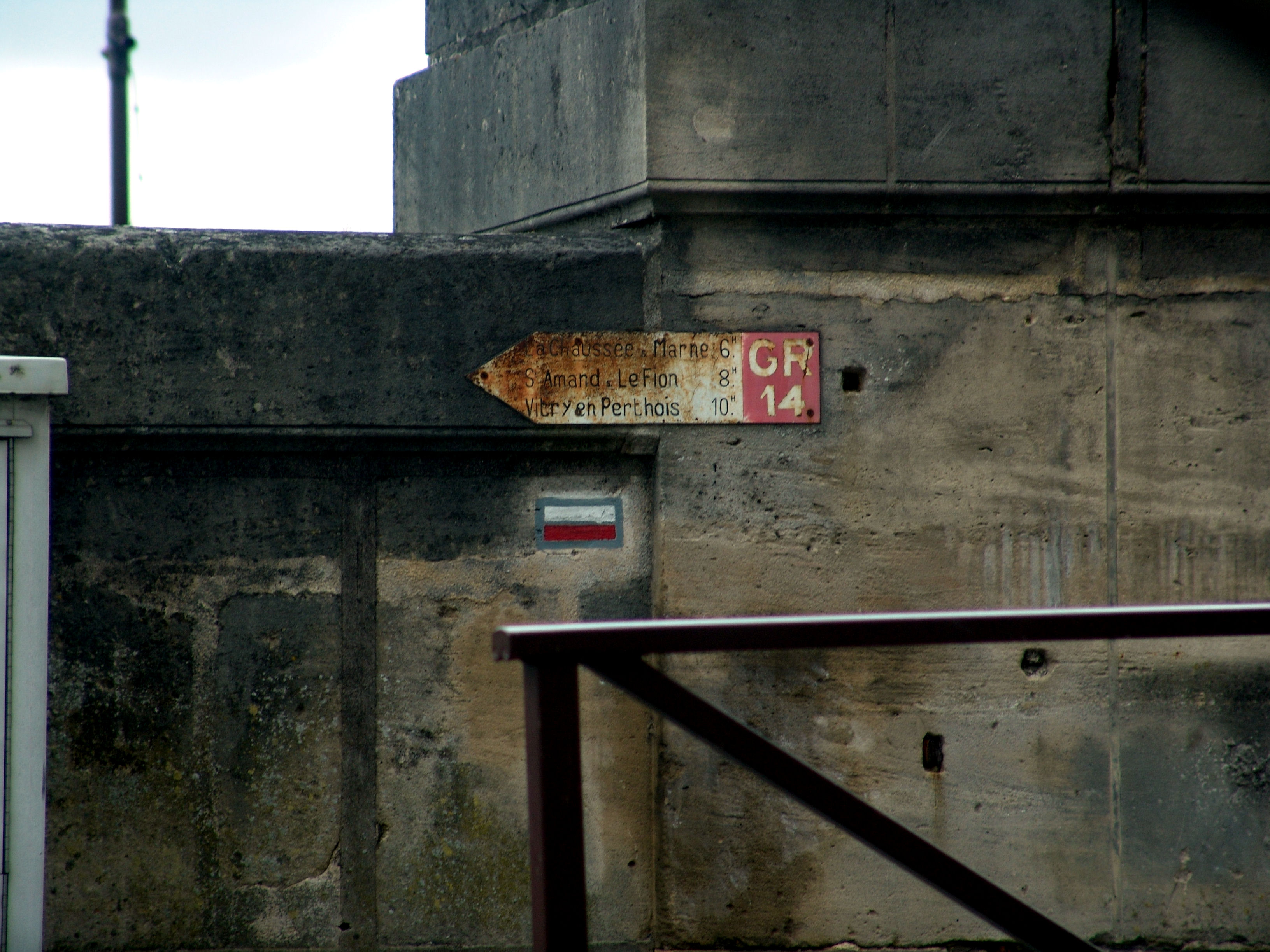 Panneau de la Grande Randonnée GR 14 en Châlons-en-Champagne